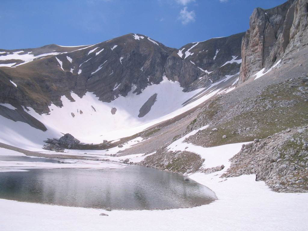 Cima del Redentore (monti Sibillini) fotografata dal Lago di Pilato.